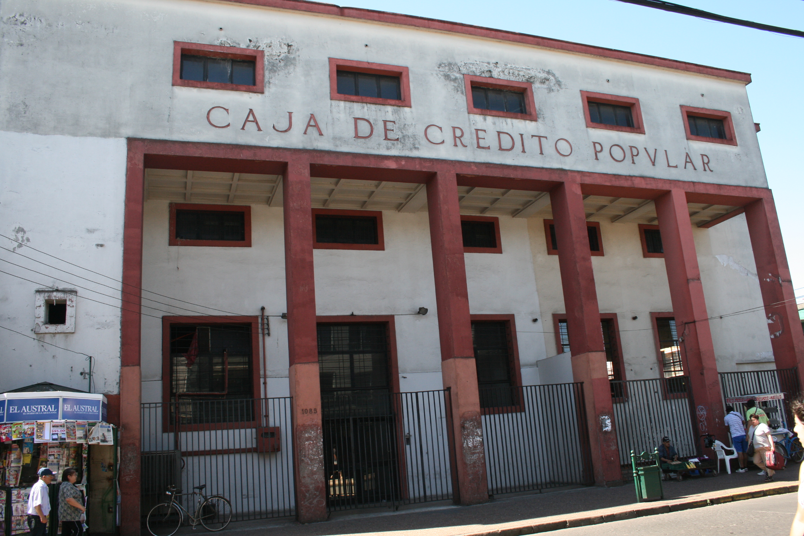 Edificio de la Caja de Crédito Popular en la ciudad de Temuco, hoy la "Tía Rica".